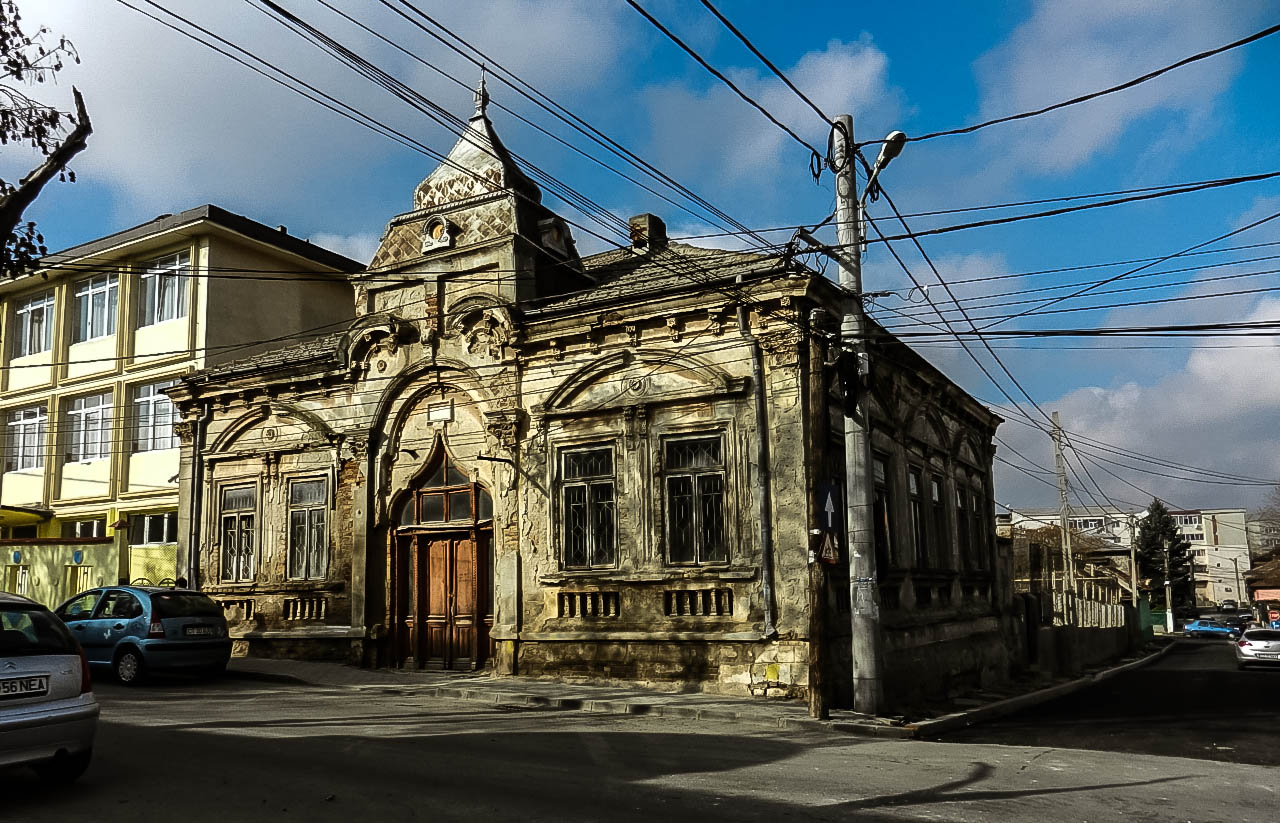 Casa lui Murad G. Ali, 1906 (langa Scoala Gimnaziala nr. 1 "Constantin Brancusi")